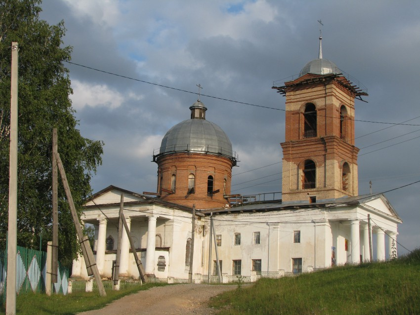 Казанская церковь в Верхнем Авзяне была построена в 1877 году заводовладельцем дворянином Дмитрием Егоровичем Бенардаки.